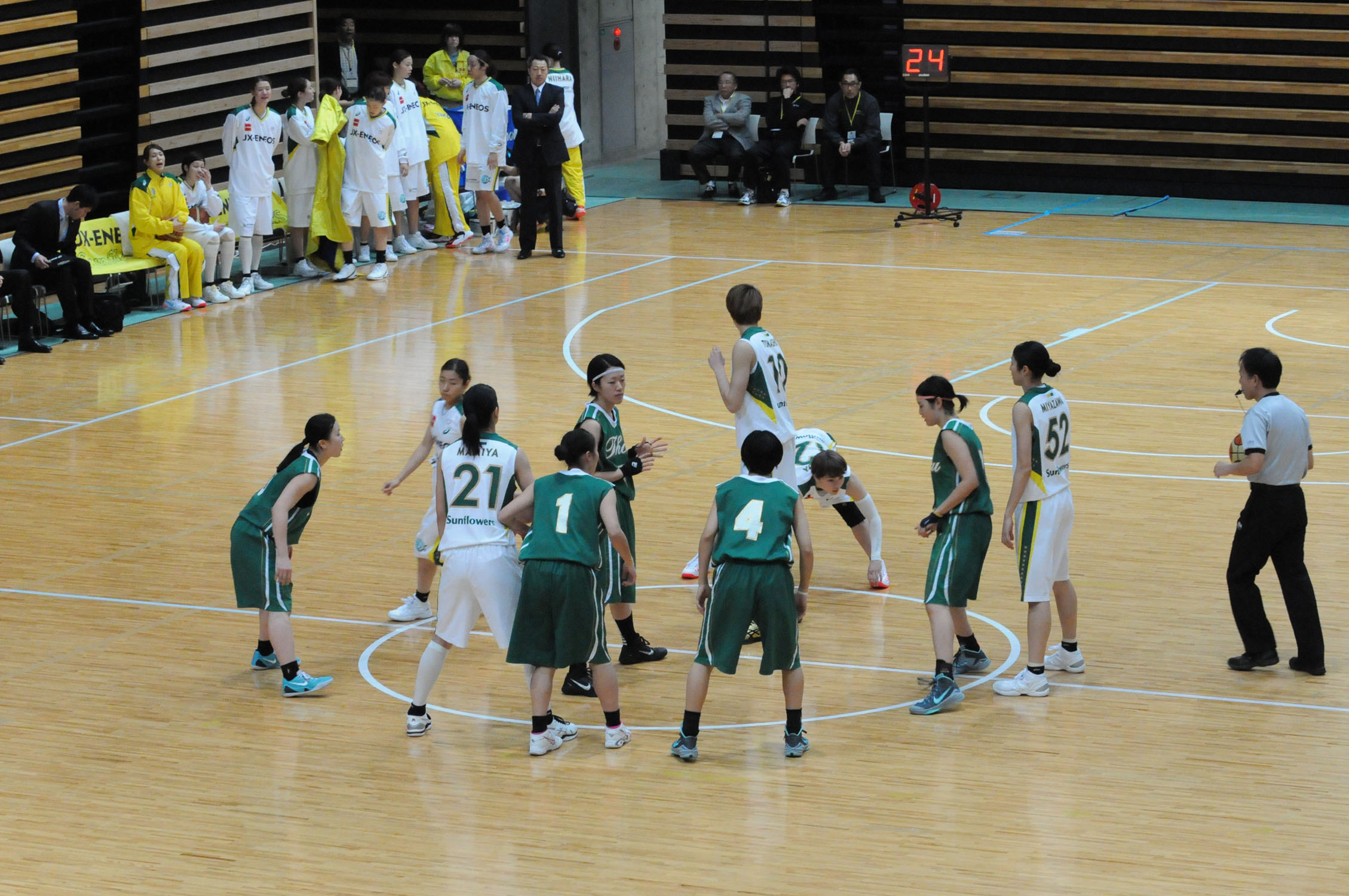 2015年全日本総合バスケットボール選手権大会3回戦、JX-ENEOSサンフラワーズ対東京保健医療大学。大田区総合体育館で。